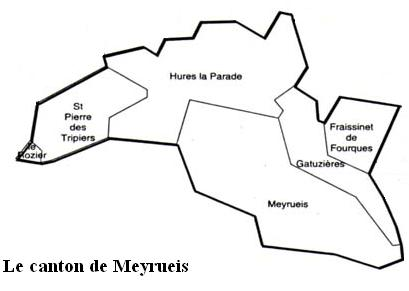 Le canton de Meyrueis Image personnelle